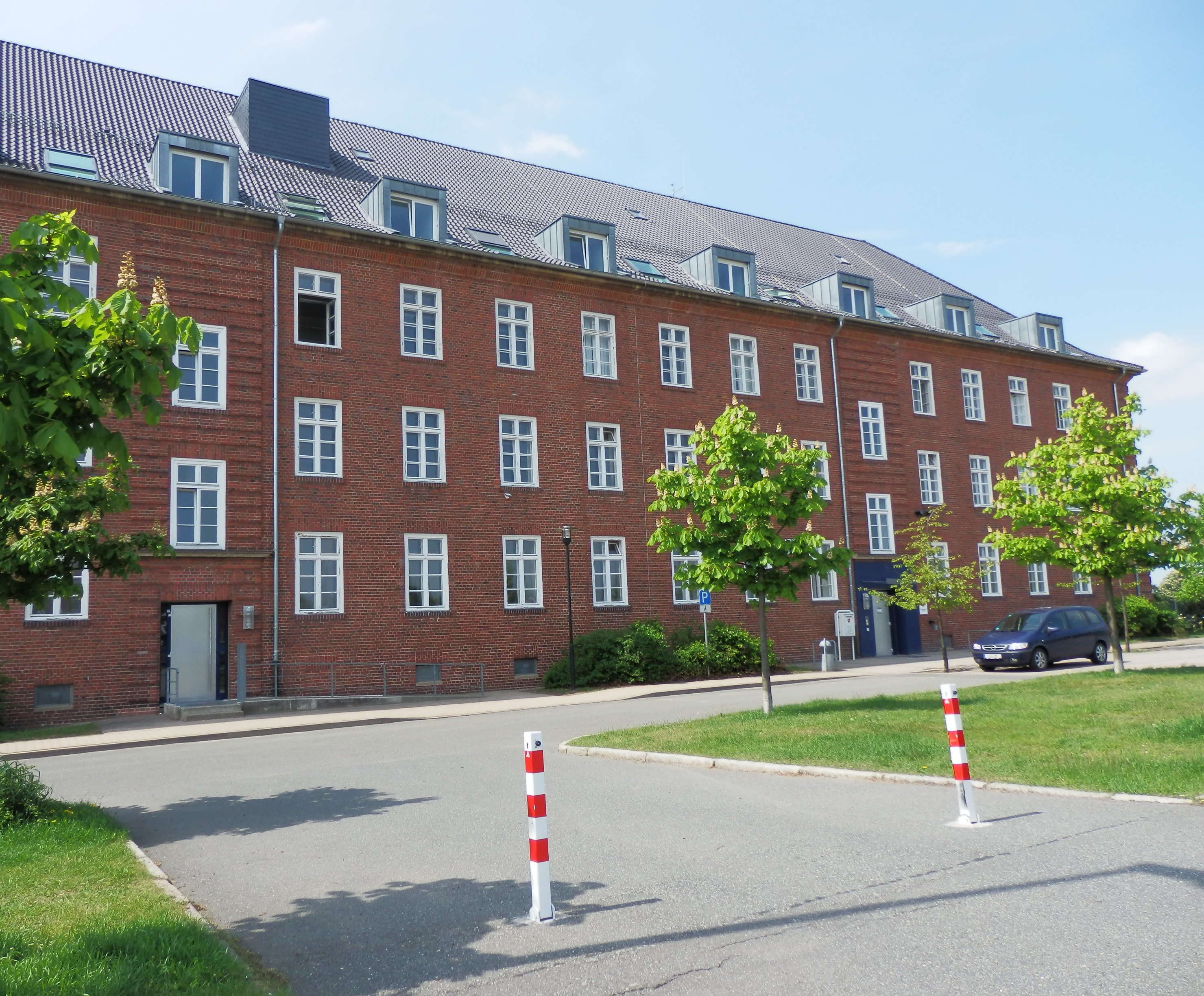 Sozialgericht, neues Gebäude